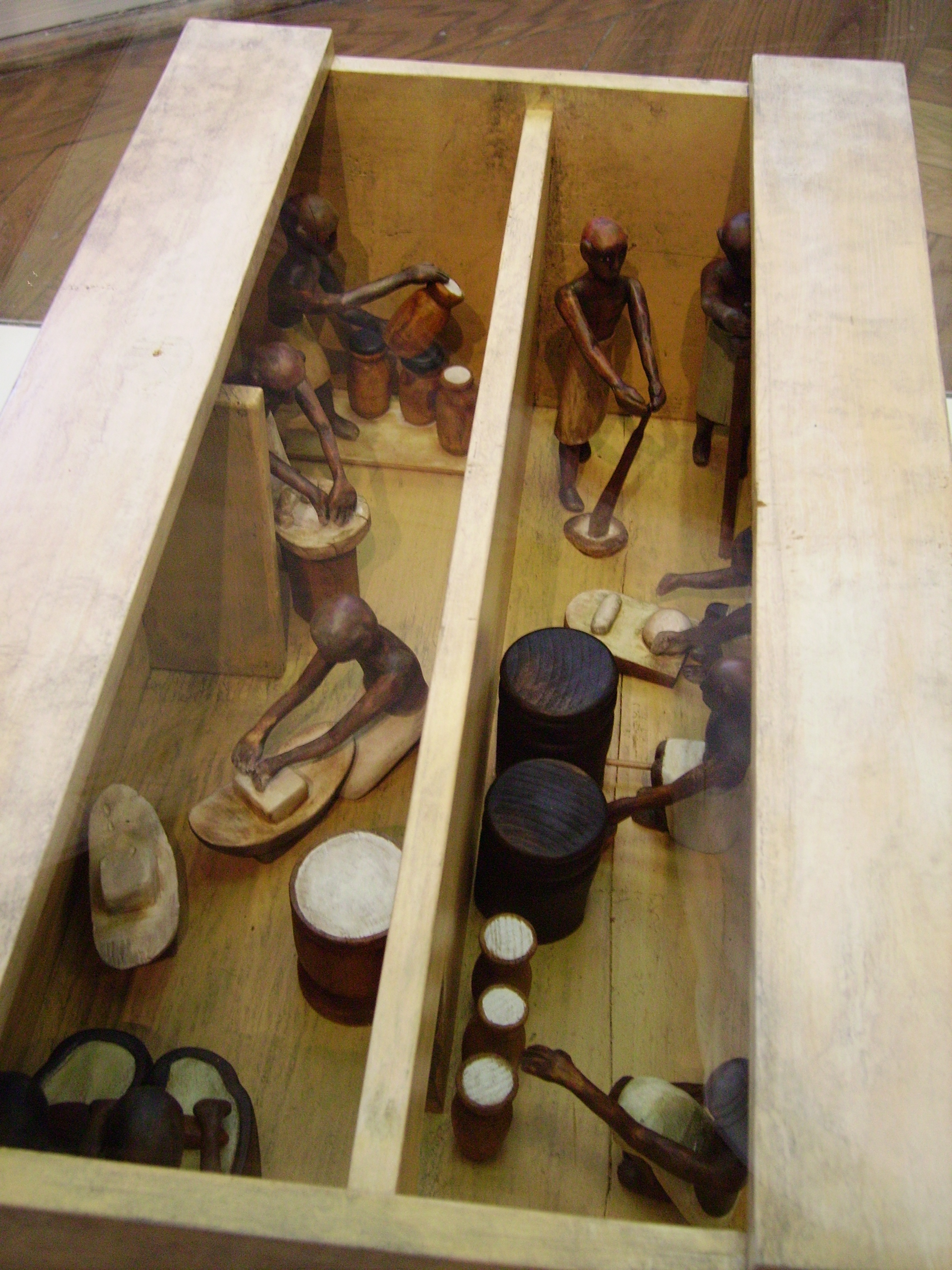 Meketreův pohřební model pivovaru; replika z výstavy Objevování starého Egypta, Náprstkovo muzeum, Praha